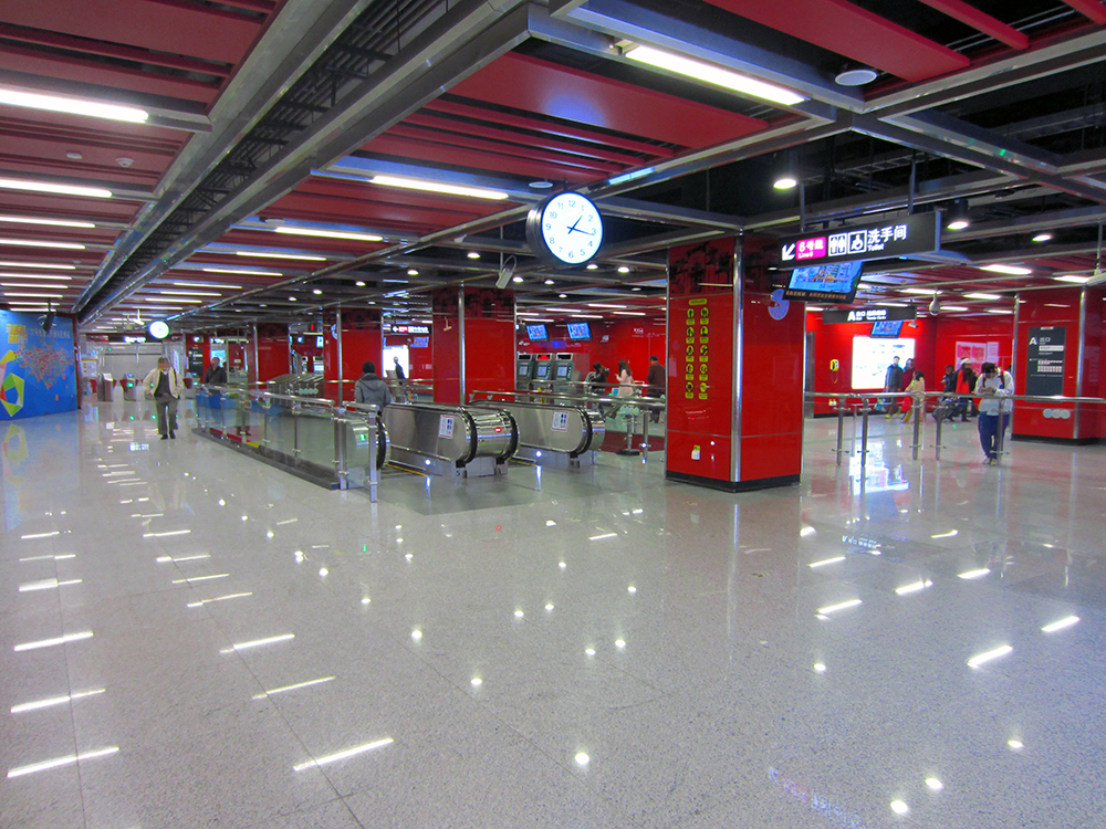 中文（香港）: 團一大廣場站站廳